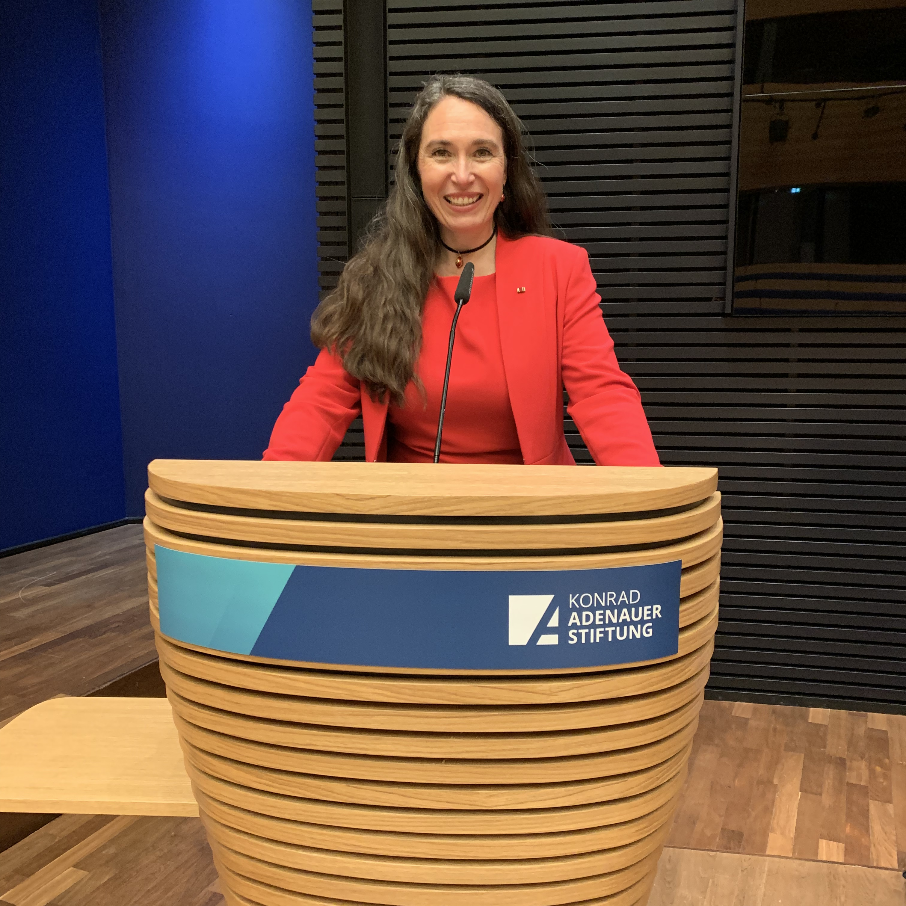 Inge Bell, Moderatorin bei einer Veranstaltung der Konrad Adenauer Stiftung in Berlin 2019.